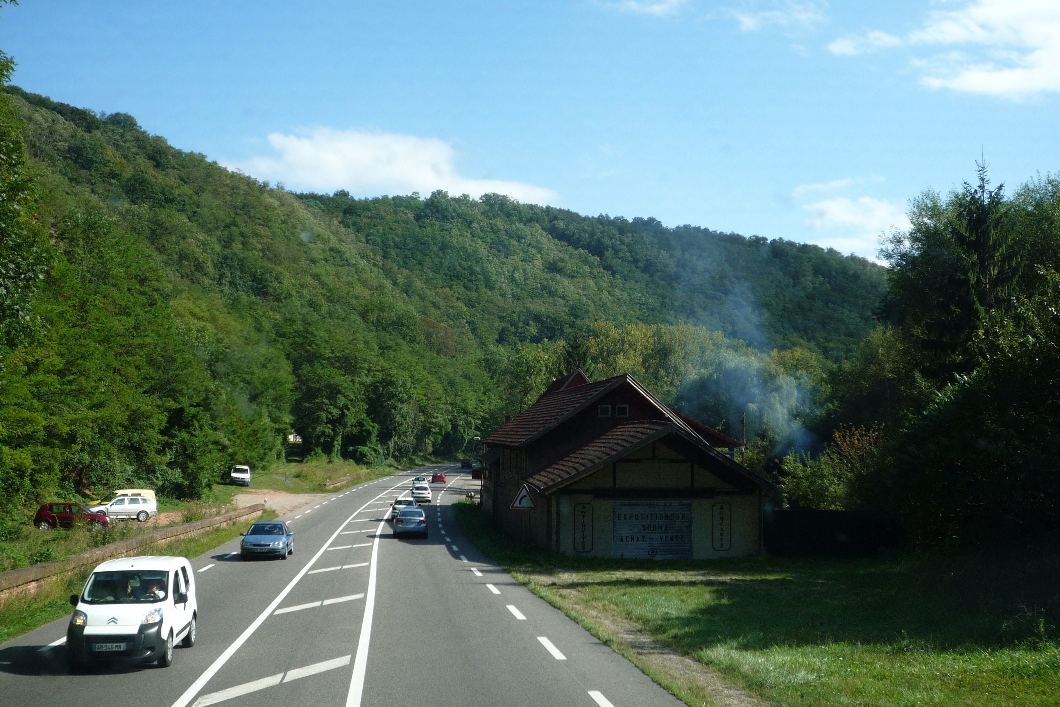 Wasselonne, Le Kronthal, 2011.